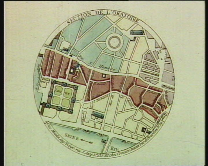 Section de l'Oratoire, Croizier, eau-forte publié chez Moulin, vers 1790 col. ; diam. 7 cm (im. Notice bibliographique de la Bibliothèque nationale de France